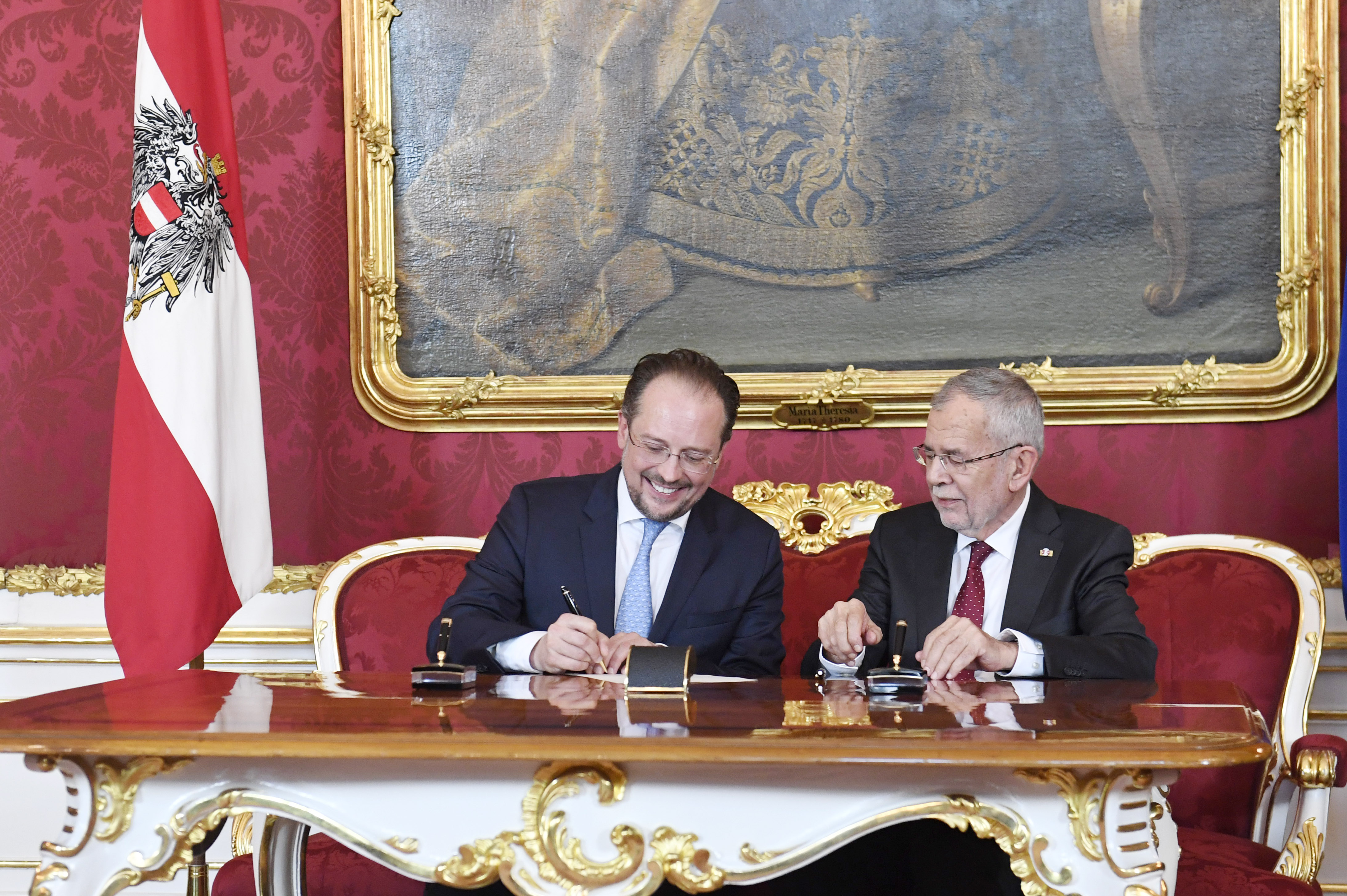 Am 3. Juni 2019 wurde Mag. Alexander Schallenberg als Bundesminister für Europa, Integration und Äußeres angelobt. Foto: Mahmoud